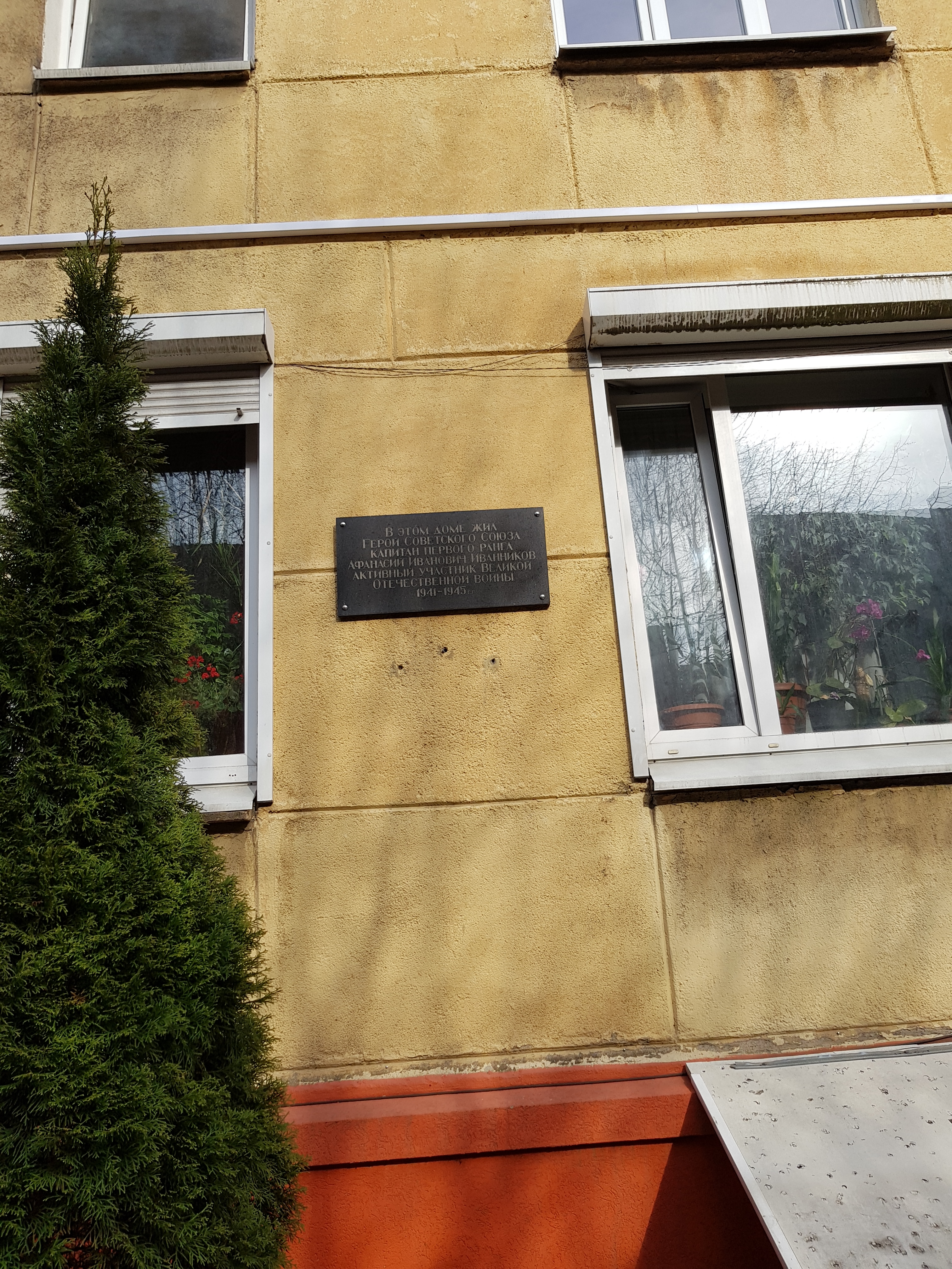 Мемориальная доска на доме по адресу Калининград, Красная 34а, где жил Герой.